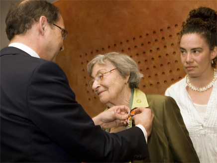 Selma Engel-Wijnberg, enige vrouwelijke Nederlandse overlevende van voormalig nazivernietigingskamp Sobibor in Polen, heeft in Westerbork een Koninklijke onderscheiding ontvangen. Minister Klink (VWS) reikte deze aan haar uit.